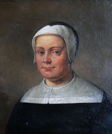 Fantasiporträtt av Margareta Hvitfeldt, målat av Gustav Brusewitz år 1858